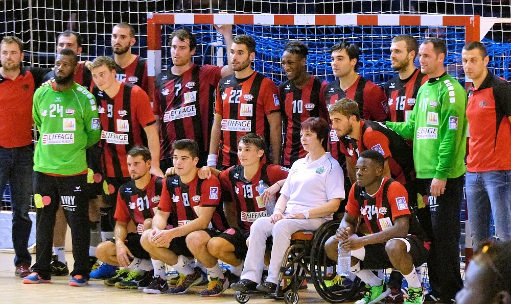 L'US Ivry après la finale (remportée par le Fenix toulouse Handball) du challenge Marrane 2014. Le 31 août 2014 à la Halle Carpentier, Paris 13e.